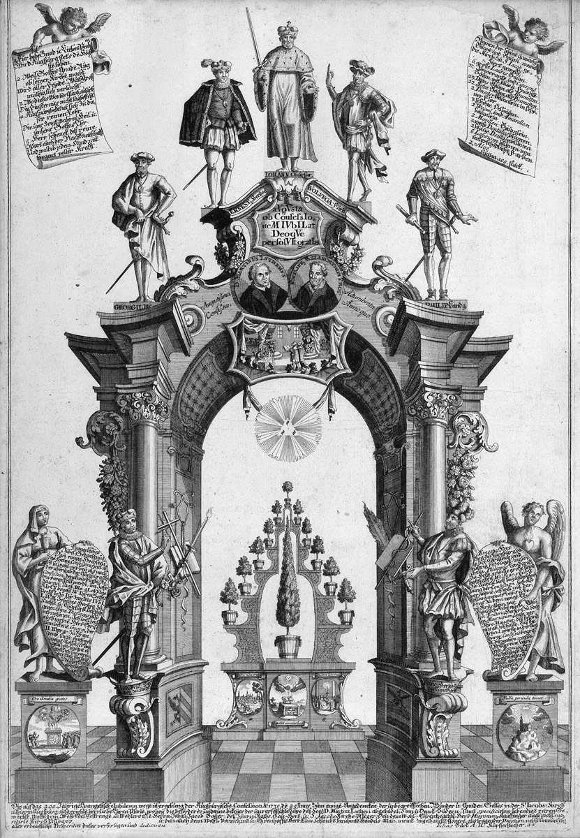 Roth, Johann Michael: Augspurgisches Iubel-Gedächtnüs. Augsburg, Roth, (1732) (zweite Ausgabe eines Tafelwerks zur 200-Jahr-Feier der Augsburger Konnfession von 1530)